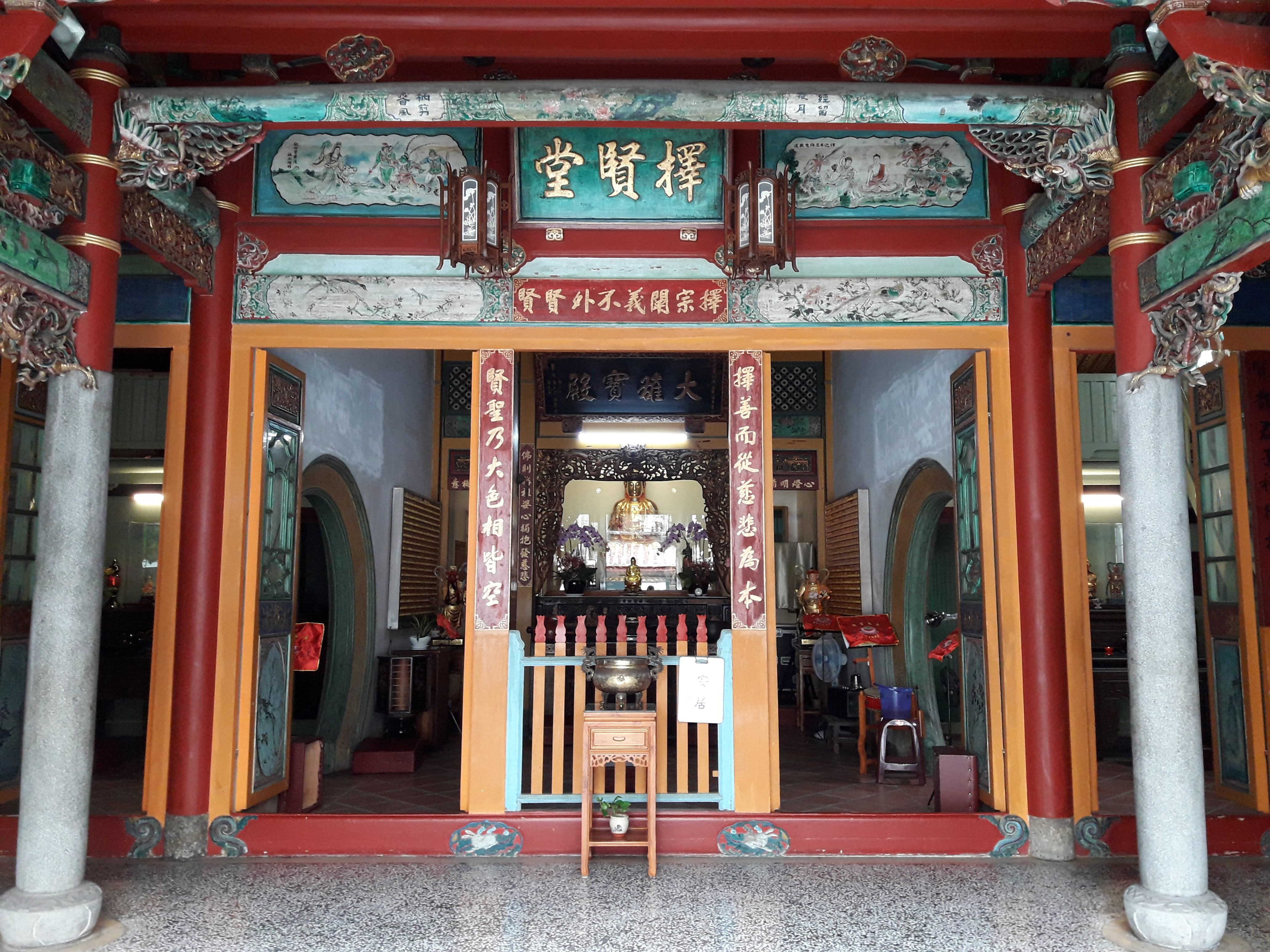 臺灣臺南市中西區擇賢堂。